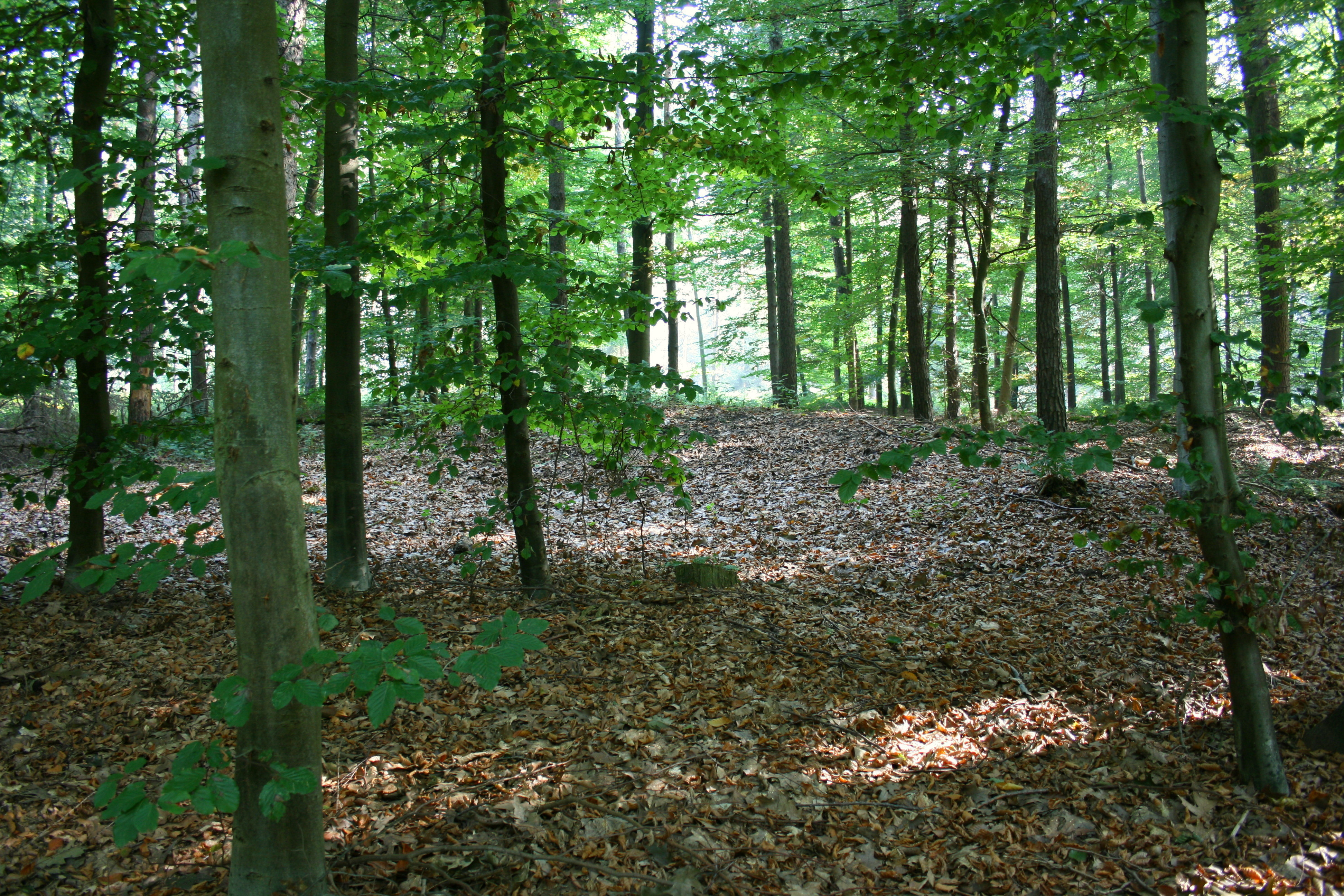 Hügelgräber im westlichen Uedemer Hochwald in Uedem, Gräberfeld etwas nördlich der Marienbaumer Straße; abgebildeter Bereich im Landschaftsschutzgebiet „Balberger Höhenrücken mit den Waldgebieten Uedemer Hochwald und Tüschenwald“